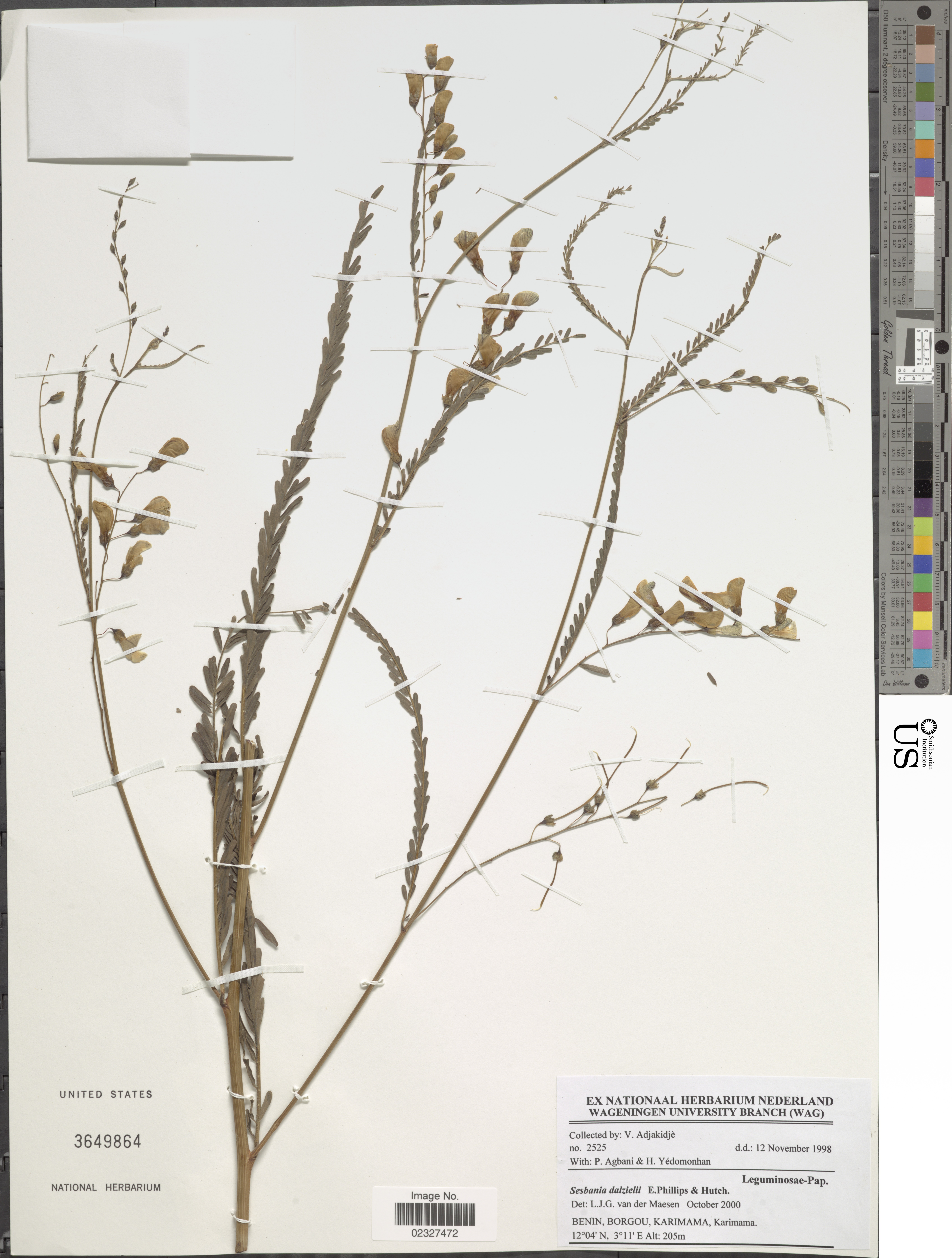 Sesbania dalzielii E. Phillips & Hutch. Object Details Biogeographical Region 22 - West Tropical Africa Collector V. Adjakidjè Min. Elevation 205 Record Last Modified 29 Dec 2017 Specimen Count 1 Collection Date 12 Nov 1998 Barcode 02327472 USNM Number 3649864 Place Karimama, Karimama, Borgou, Benin, Africa Published Name Sesbania dalzielii E. Phillips & Hutch. Taxonomy Plantae Dicotyledonae Rosales Fabaceae Faboideae NMNH - Botany Dept. Record ID nmnhbotany_13373998 Usage of Metadata (Object Detail Text) CC0 GUID (Link to Original Record)